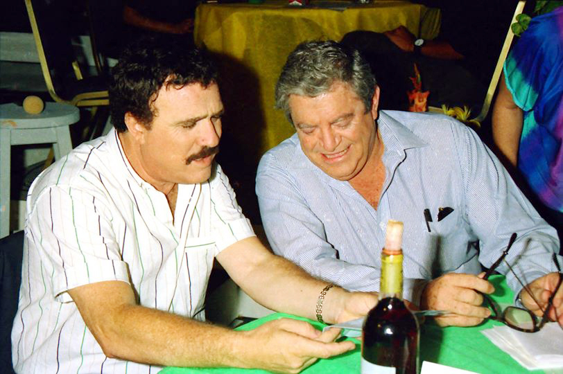 יהורם גאון ומנחם גולן בערב הדרן לקולנוע הישראלי